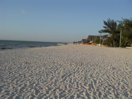 pianta della riserva di celestun